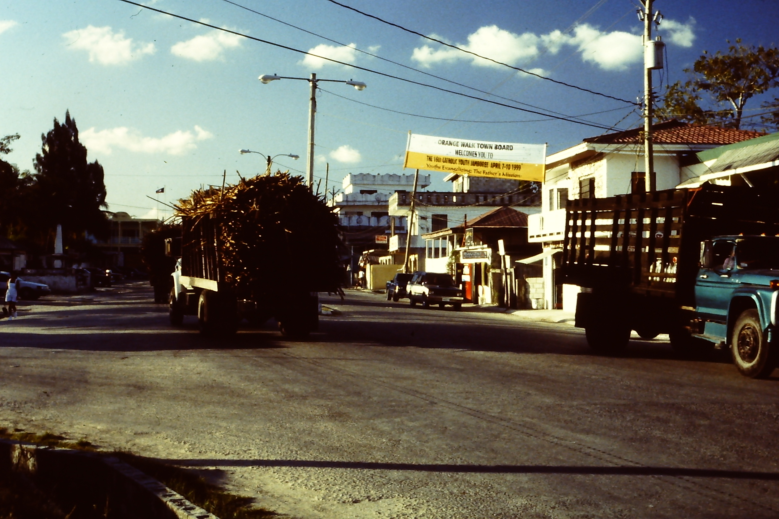 Orange Walk, Belize, Strassenszene